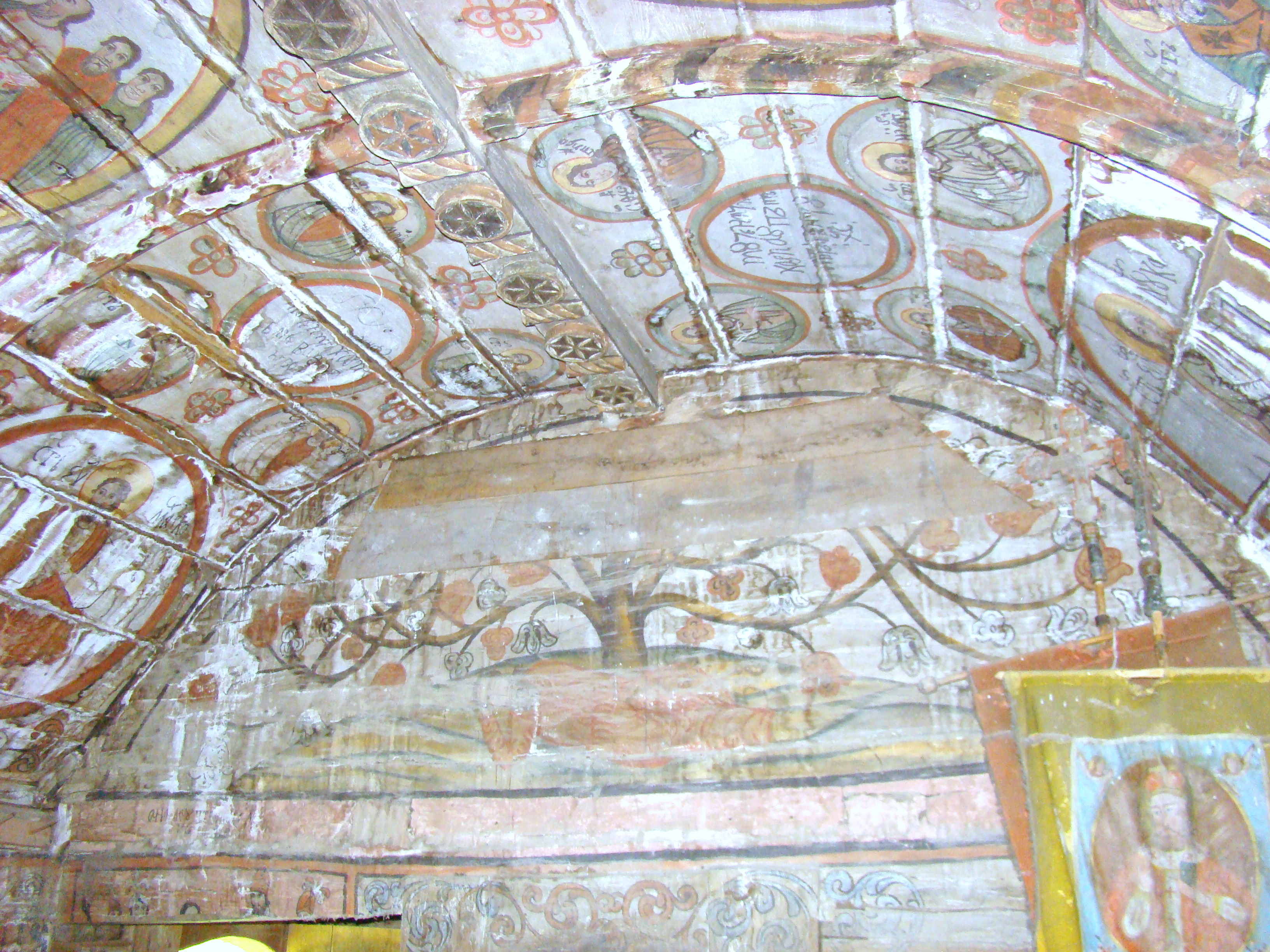 Biserica de lemn din Gârbău Dejului